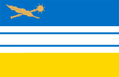 Прапор Новоархангельського району Кіровоградської області